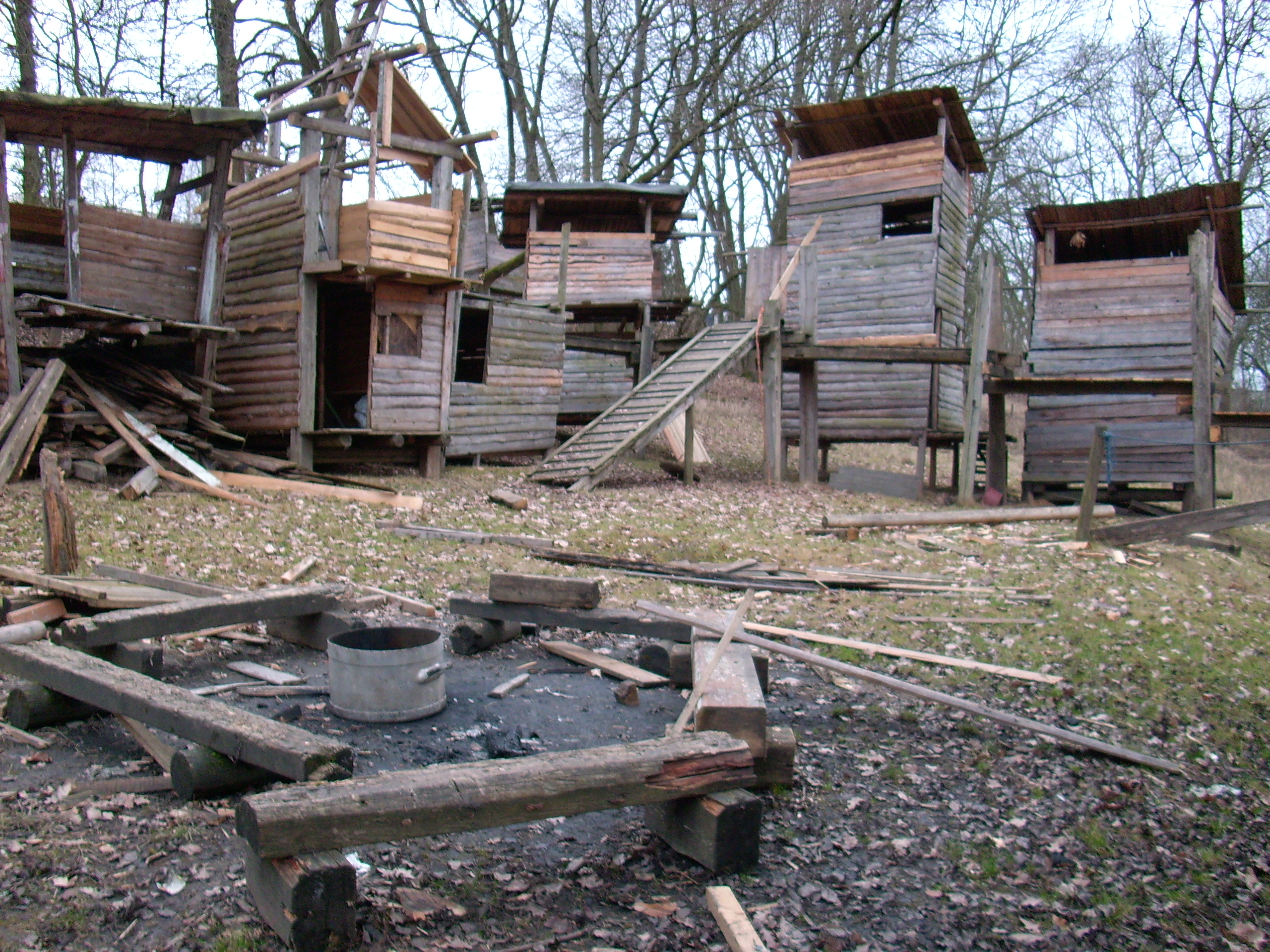 Bauspielplatz der Jugendfarm Freiberg (Stuttgart)